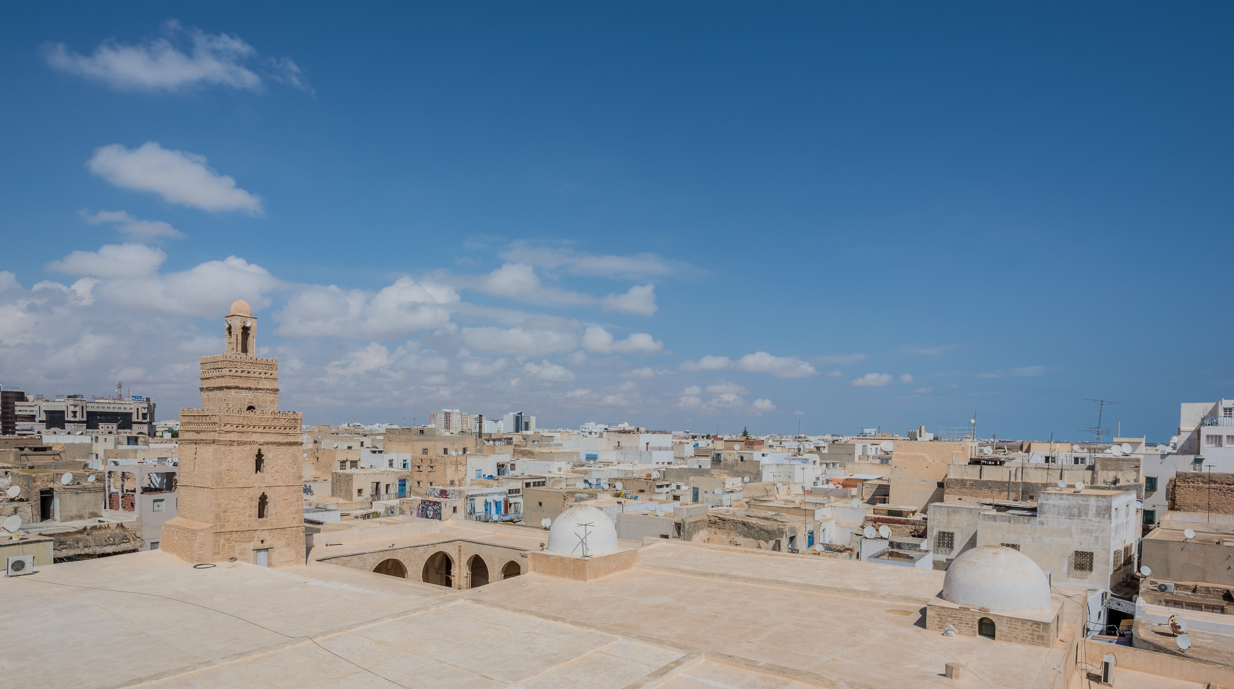 Grande mosquée